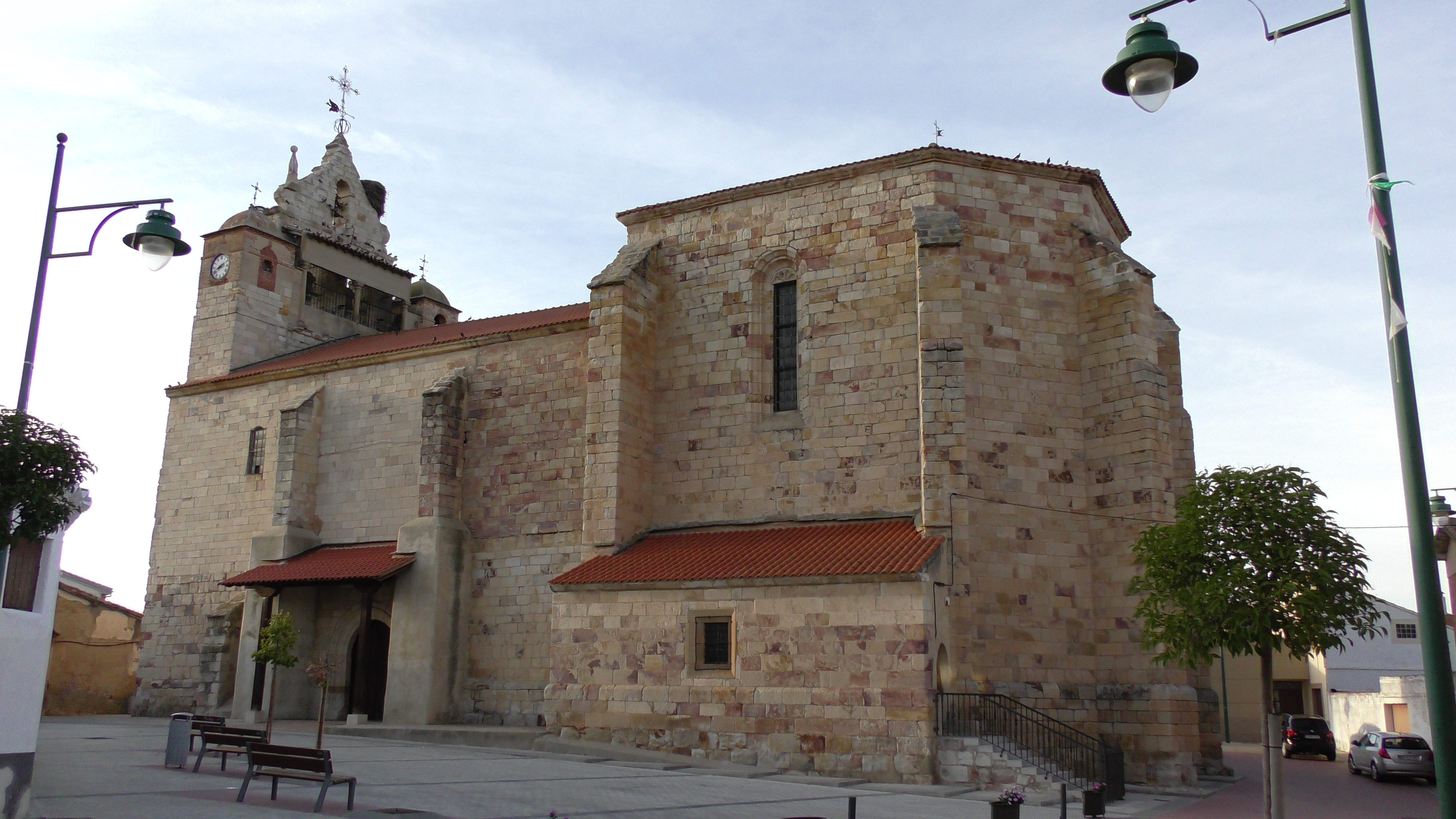 Villaralbo